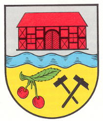 Wappen von Frohnhofen